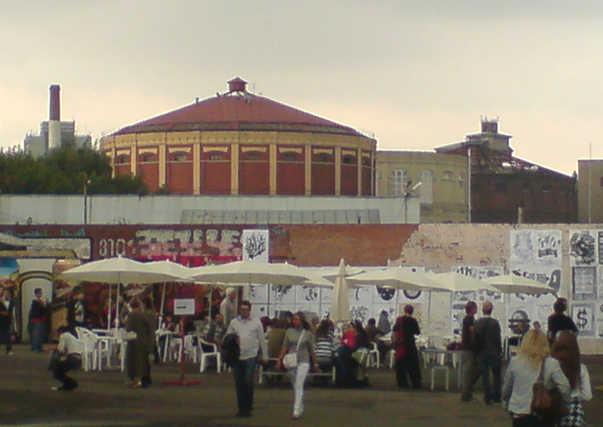 Вид на газгольдеры Московского газового завода (ныне "Арма") со стороны выставочного комплекса "Винзавод".